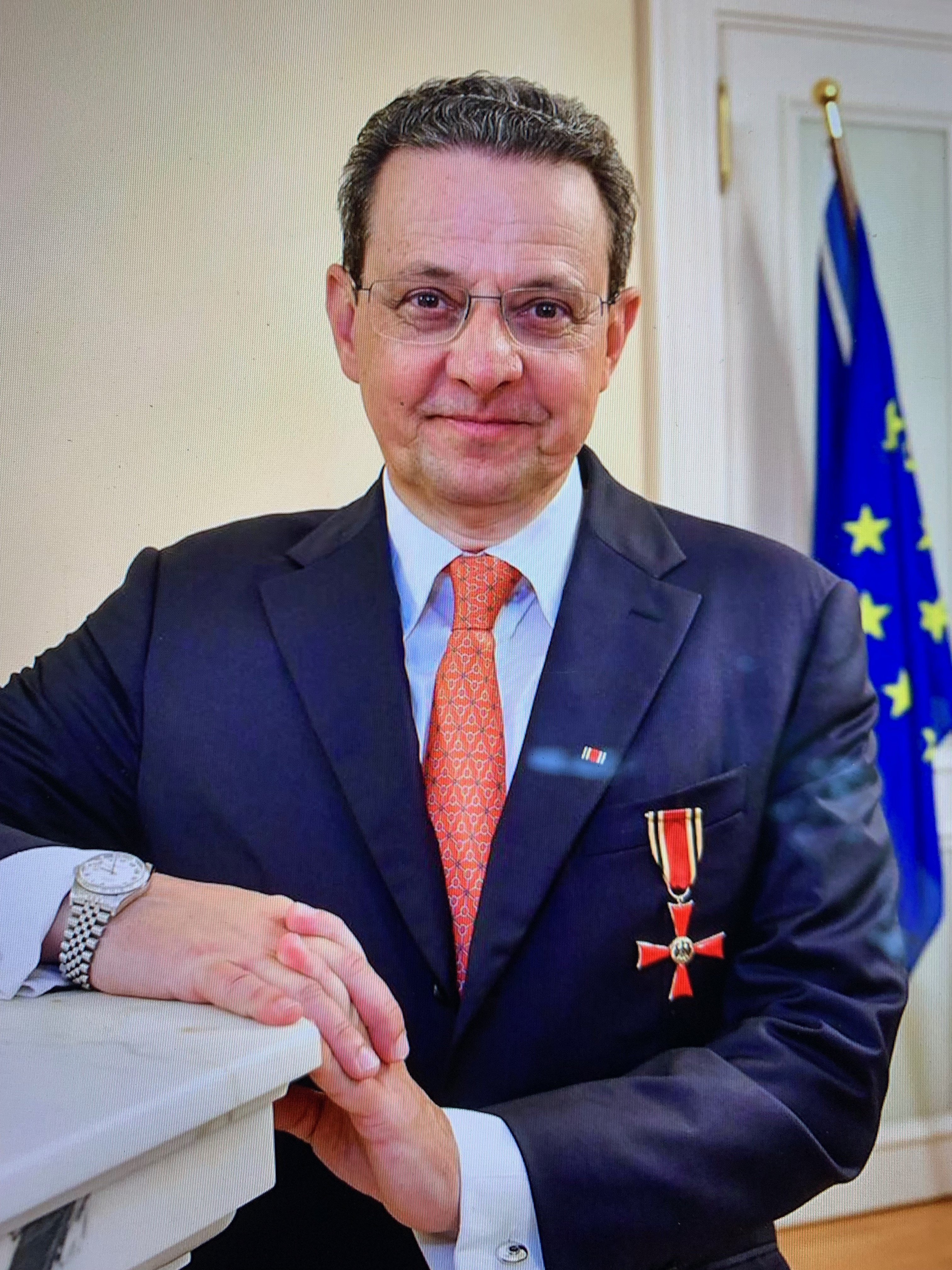 Hartmuth Jung bei der Verleihung des Bundesverdienstkreuzes am 12. Juli in der Staatskanzlei in Wiesbaden